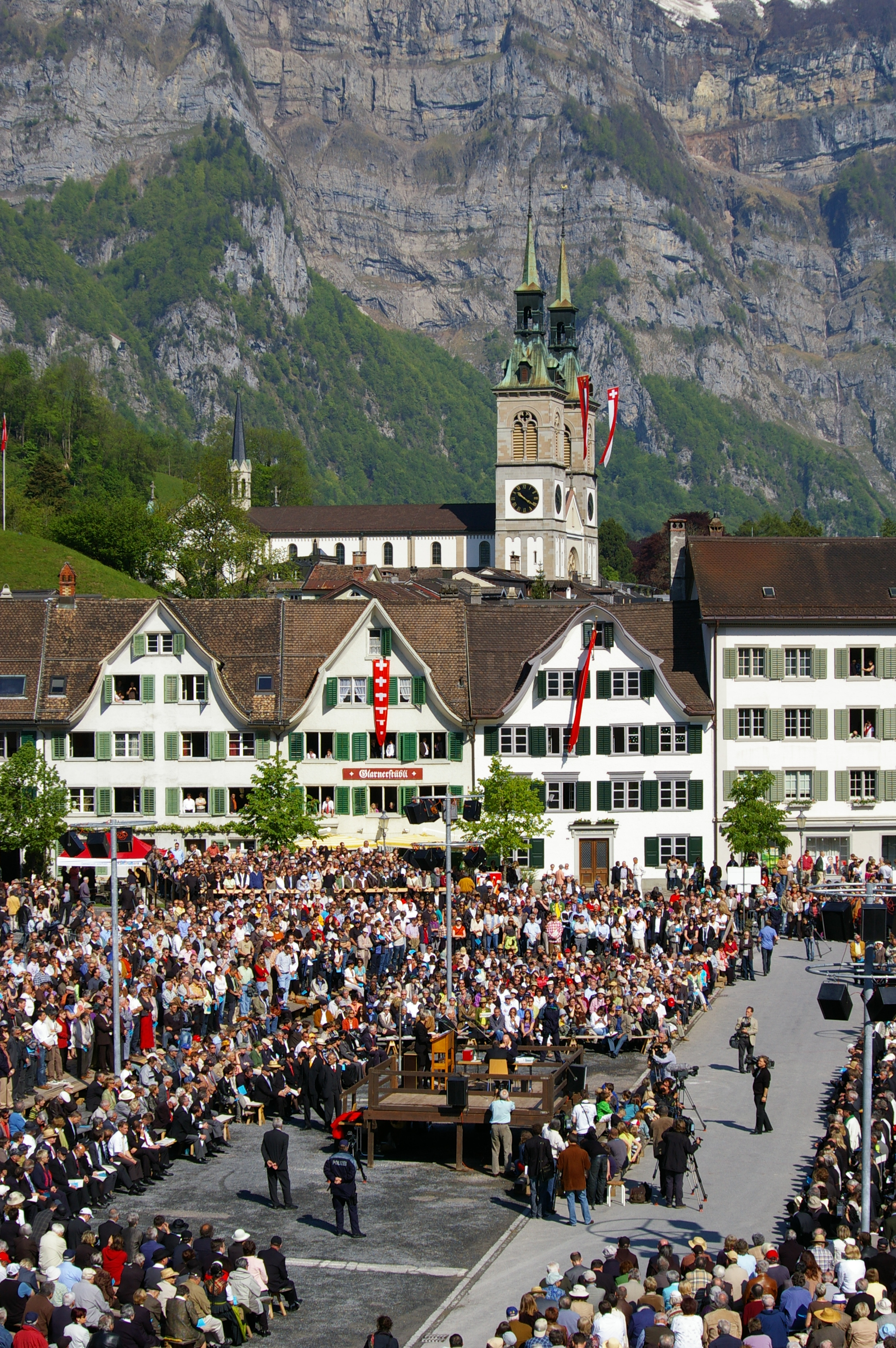 Landsgemeinde in Glarus vom 3. Mai 2009